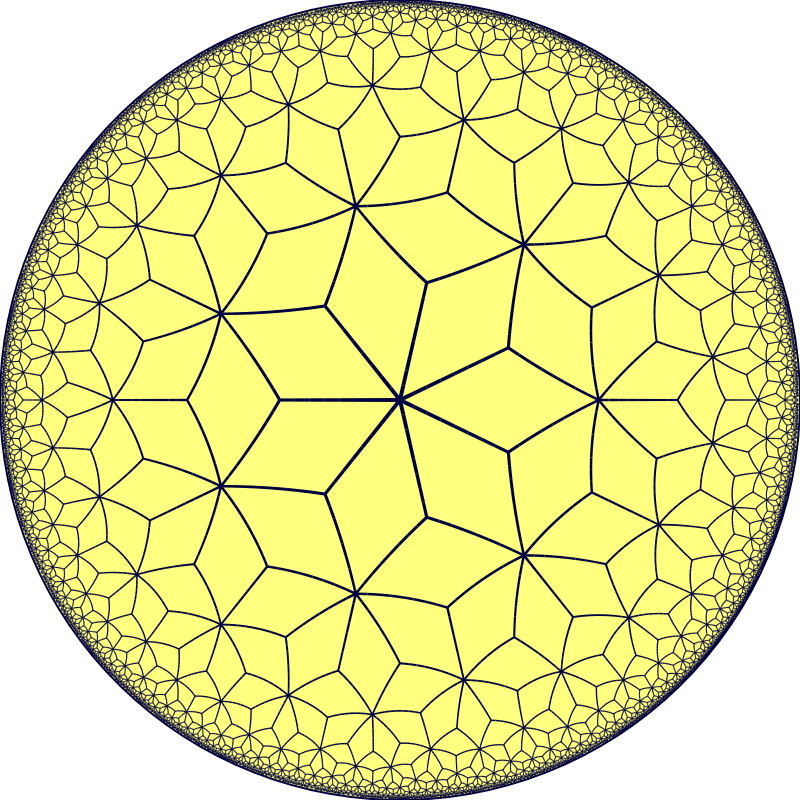 Hyperbolic Order 7-3 quasiregular rhombic tiling